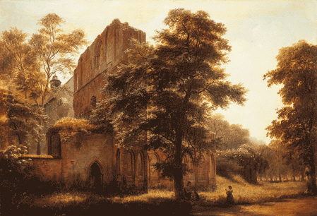 Westfassade Ecke Nordseite, 1858